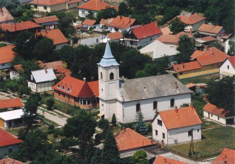 Tószeg, Hungary, aerialphotgraphy